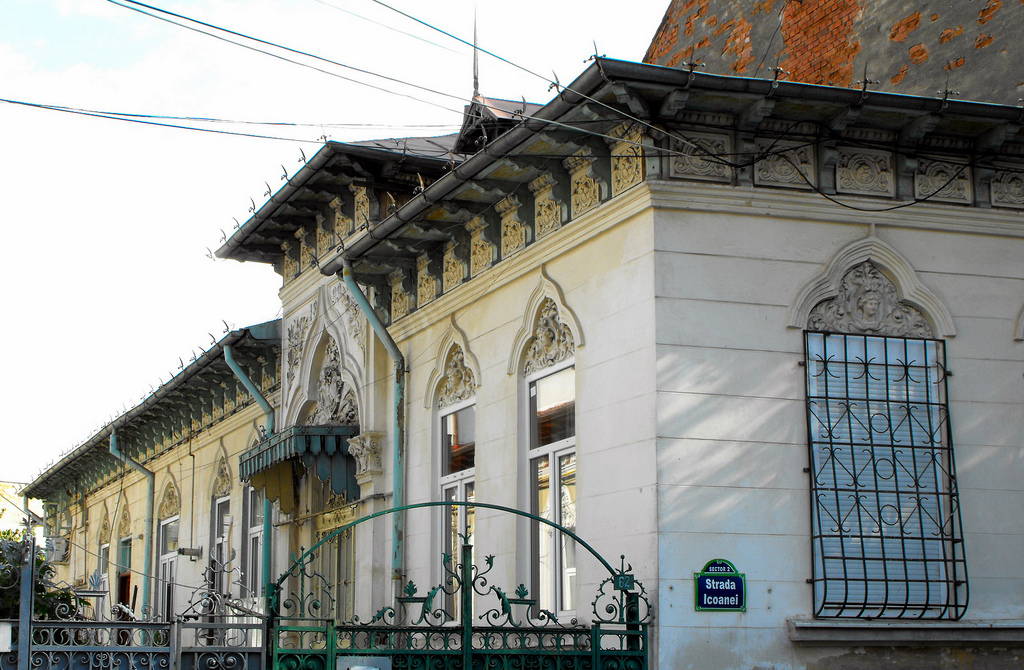 Icoanei 62